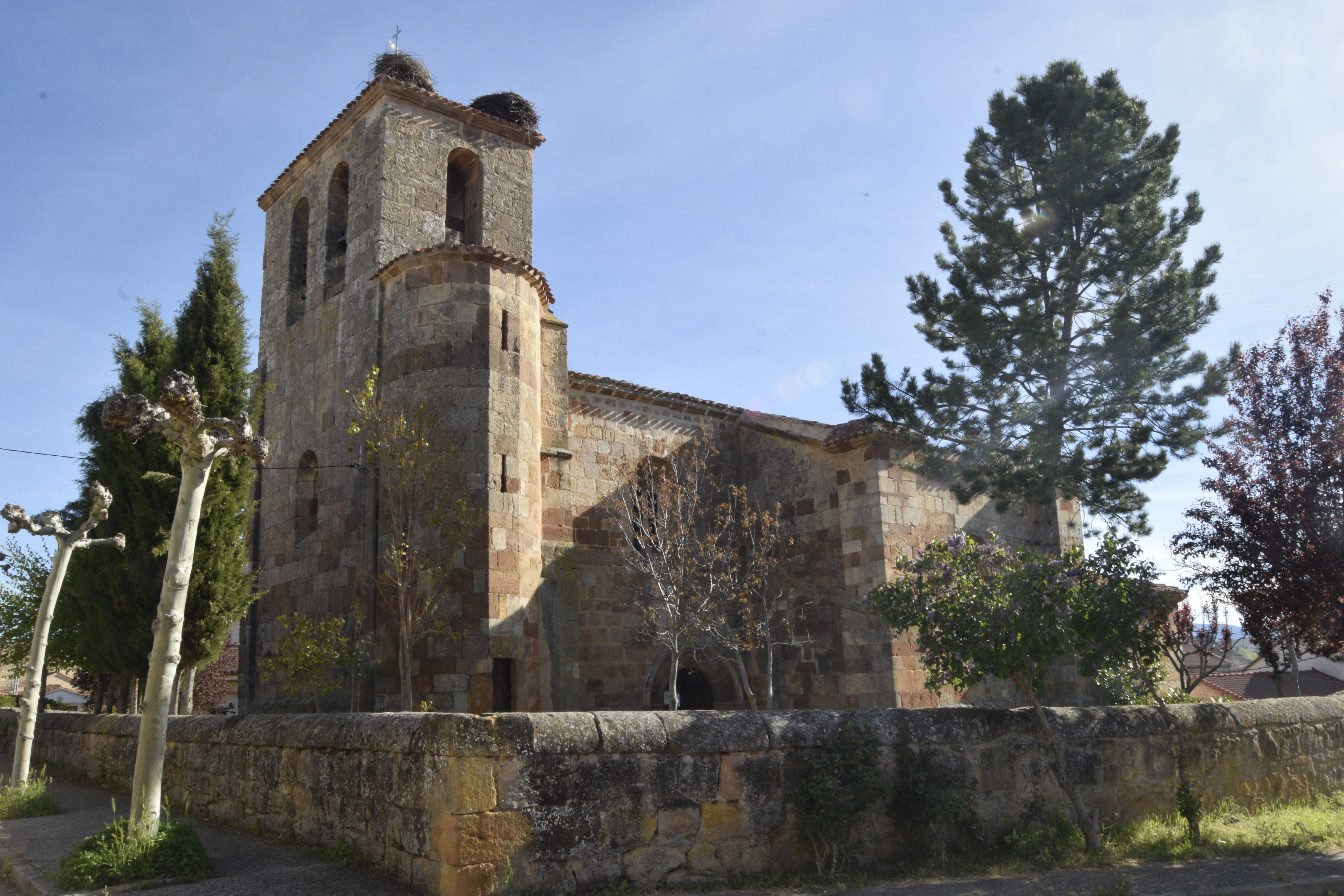 Iglesia parroquial de La Asunción de Hortigüela (Burgos).